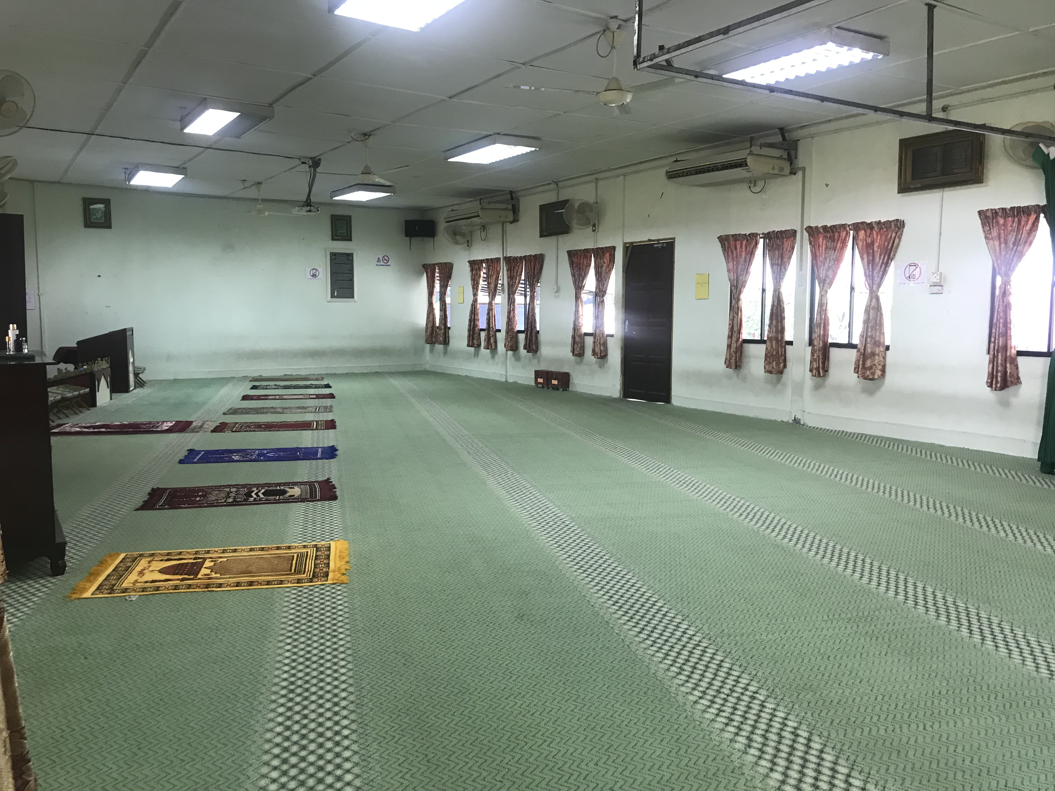 Dalaman Surau Al Amin